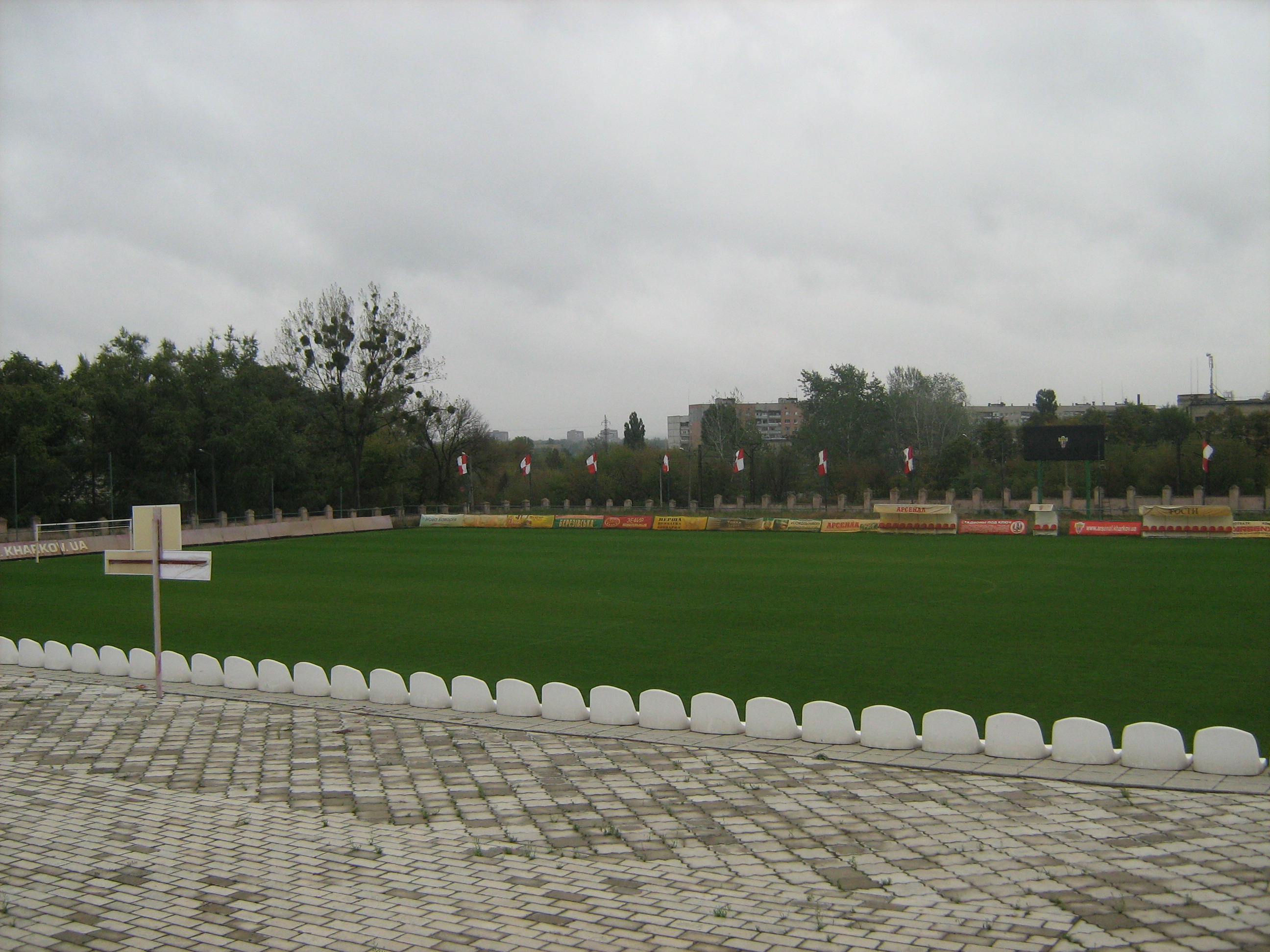 Стадион «Арсенал-Бавария» в Харкове.